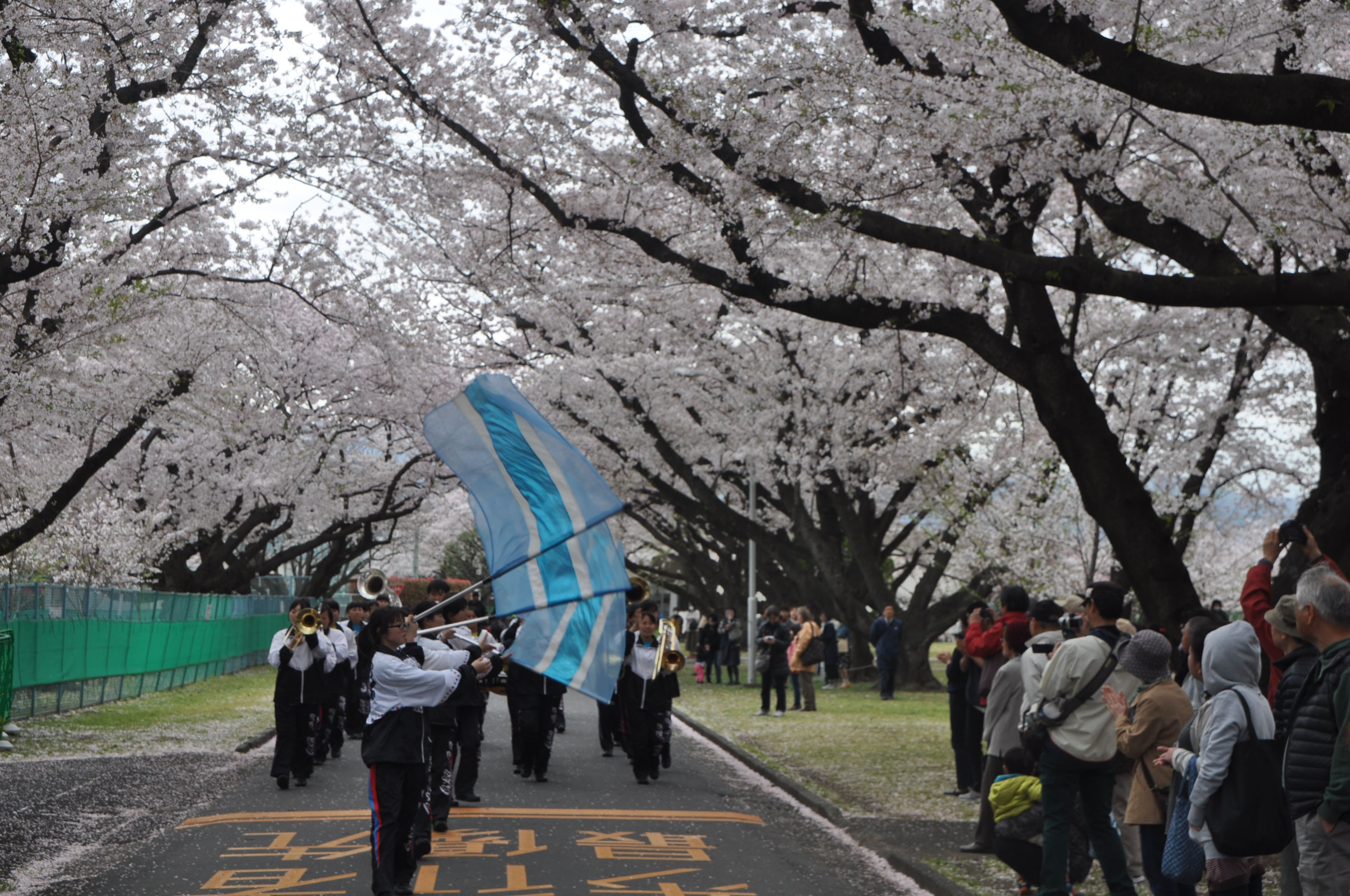 Cherry Blossoms 2 at National Printing Bureau's Odawara Plant, Kanagawa, Japan